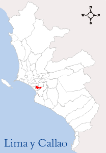 Localización del Distrito de Surquillo